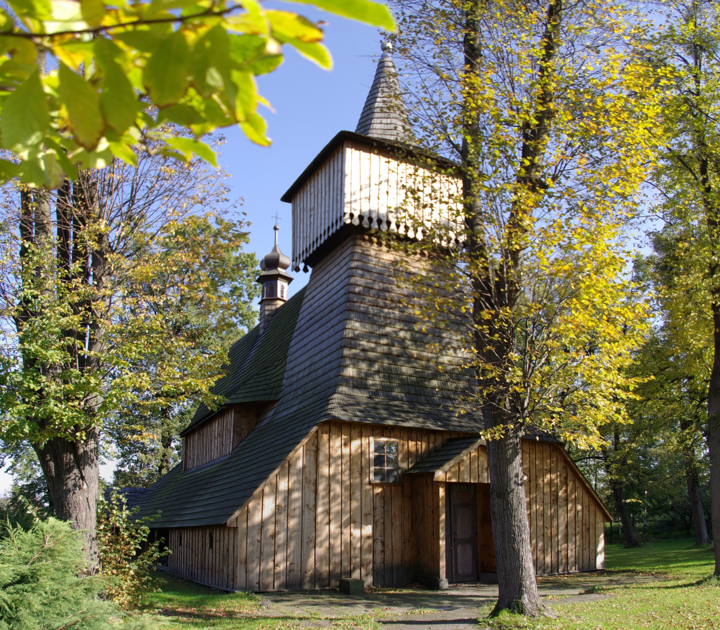 Nidek, Kościół pw. św. Apostołów Szymona i Judy Tadeusza